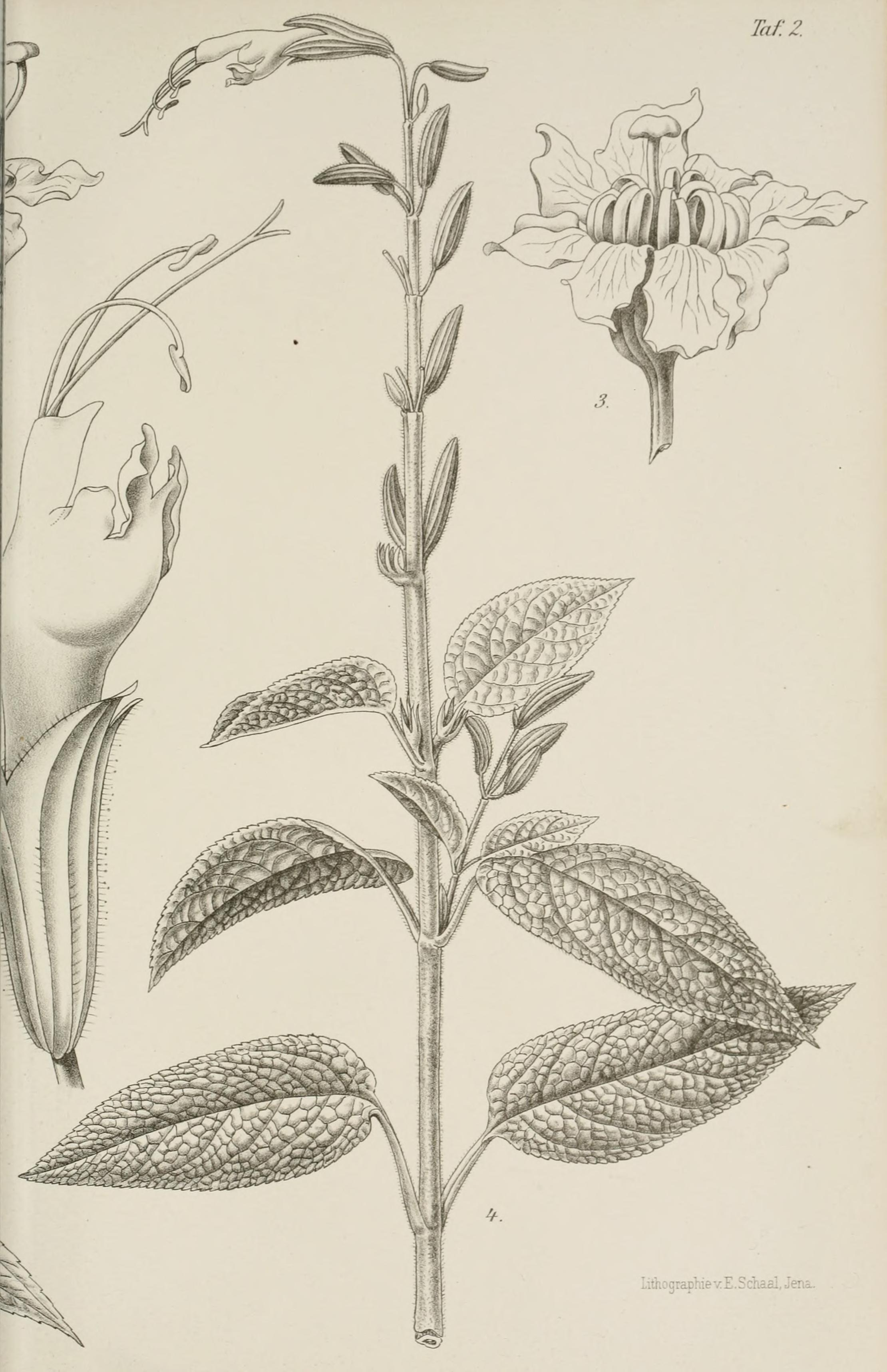 Auf einer Reise in Westindien und Südamerika gesammelte Pflanzen / von Therese, Prinzessin von Bayern ; mit Diagnosen neuer Arten von Neger, Mez, Cogniaux, Briquet, Zahlbruckner und O. Hoffmann.